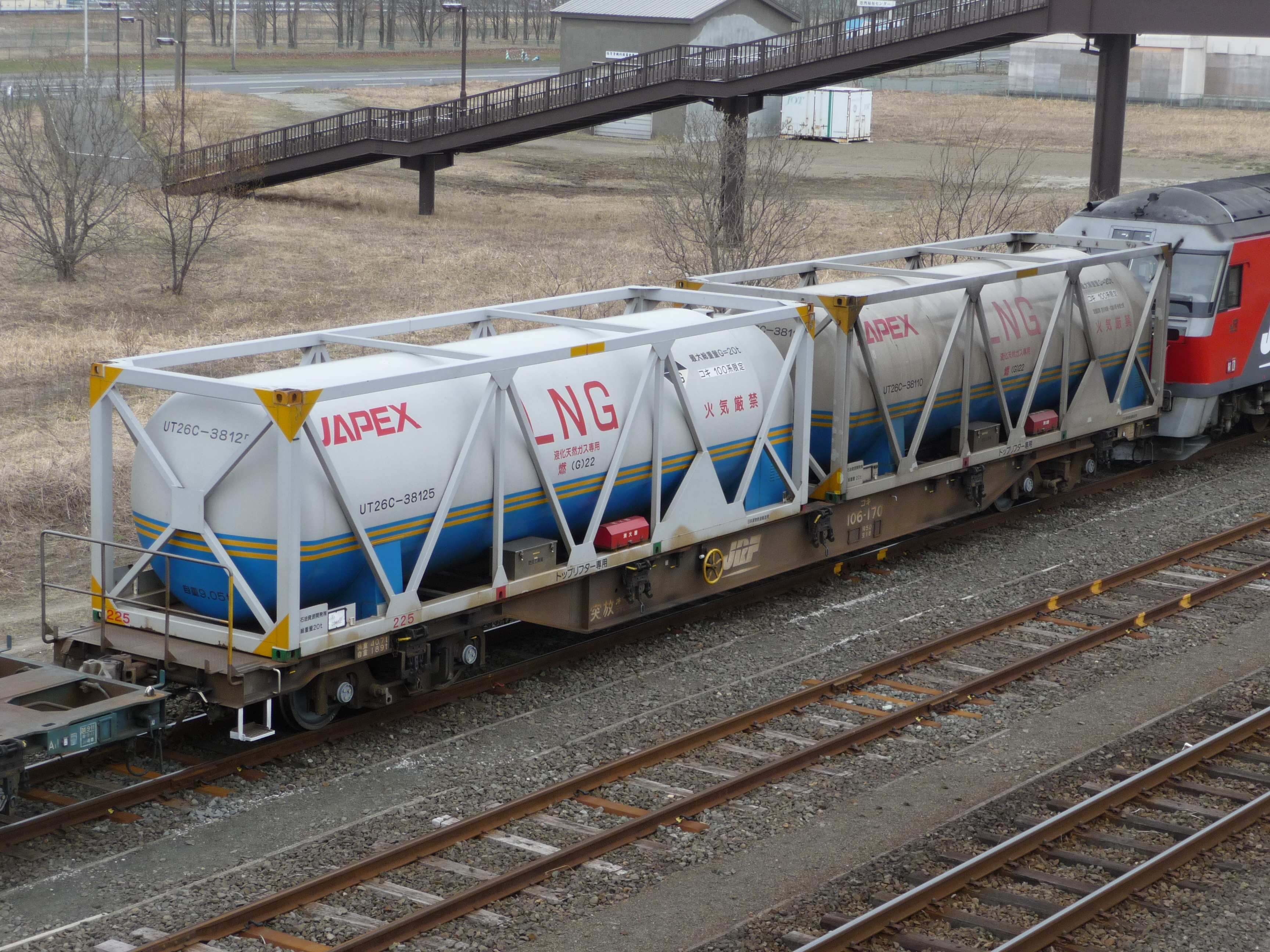 JR貨物コキ106形コンテナ車（コキ106-170）。根室本線・新富士駅で撮影。 Panasonic Lumix DMC-TZ5